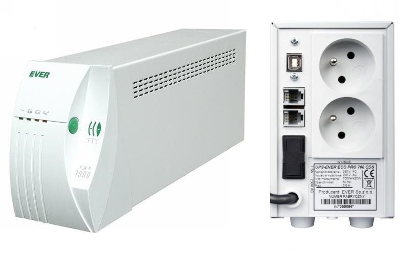 Zasilacz awaryjny EVER ups eco pro 700 cds